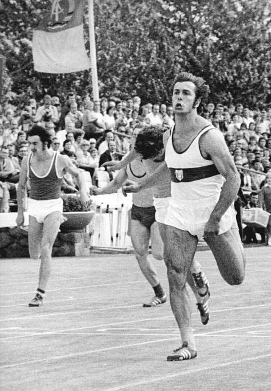 Eugen Ray ADN-ZB Demme 27-8-77 Halle: Klubpokalfinale der DDR-Leichtathleten- Über 100 m gab es durch den Hallenser Eugen Ray (rechts) in 10,13 s den erwarteten Favoritensieg. Er verfehlte seine eigenen DDR-Bestmarke lediglich um eine Hundertstelsekunde. Für den Großteil der DDR Spitzenklasse war dieser Wettbewerb ein erster Test vor dem Weltpokal am kommenden Wochenende in Sinseldorf.